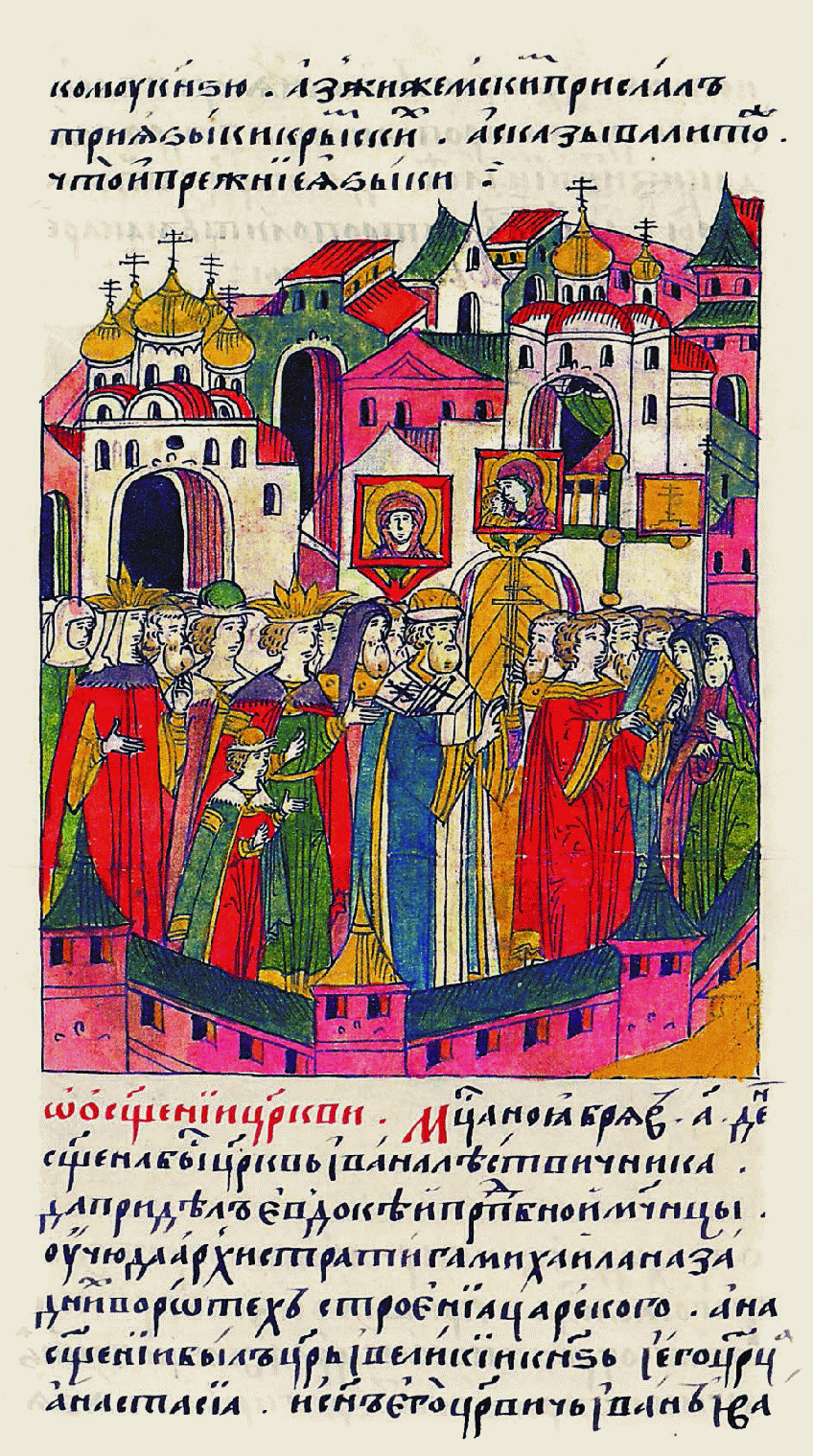 Лицевой летописный свод "Об освящении церкви. Месяца октября в 1 день освящена была церковь Иоанна Лествичника да придел Евдокии преподобномученицы у Чуда архистратига Михаила на задних вратах царского строения. А на освящении был царь и великий князь, и его царица Анастасия, и сын его царевич Иоанн Иоаннович, да брат его князь Юрий Васильевич, да митрополит из Цареграда кизицкий Иоасаф, да старцы Святой горы; а освящал Макарий митрополит всея России со всем собором."